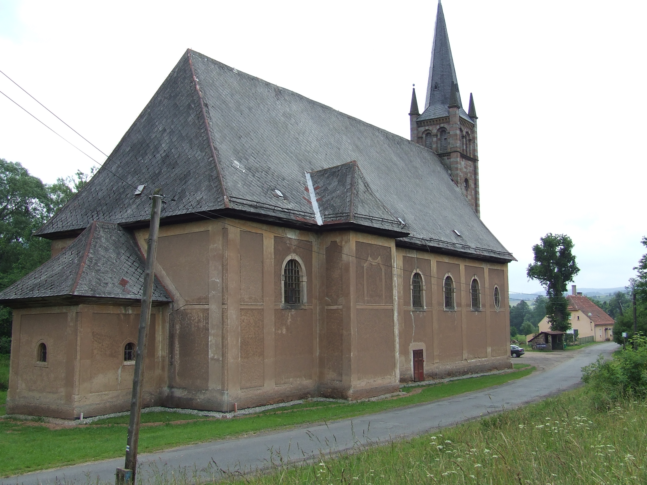 Kirche Maria Geburt im Dorf